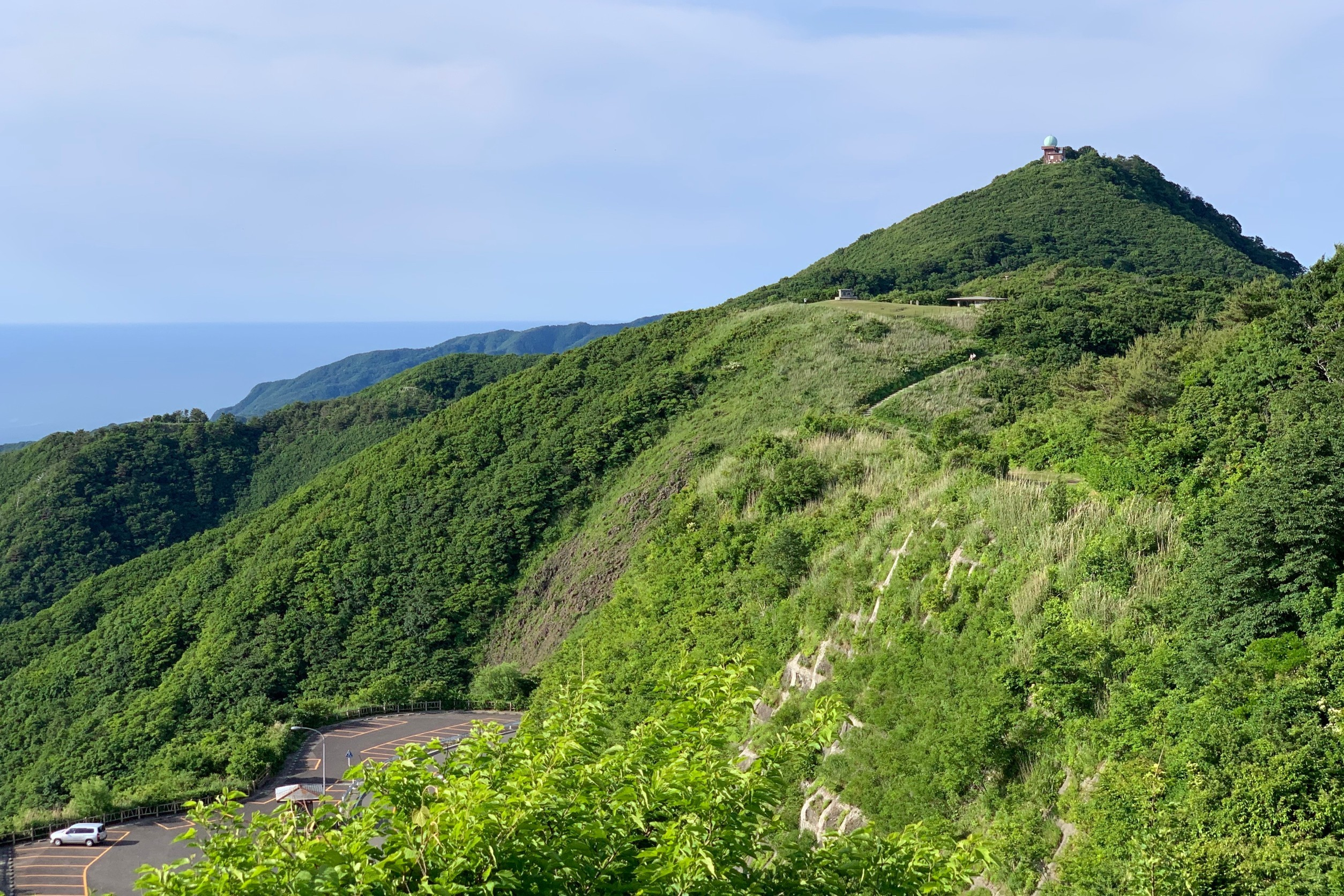 多宝山山頂と新潟地方気象台「弥彦山気象レーダー観測所」（2020年6月）